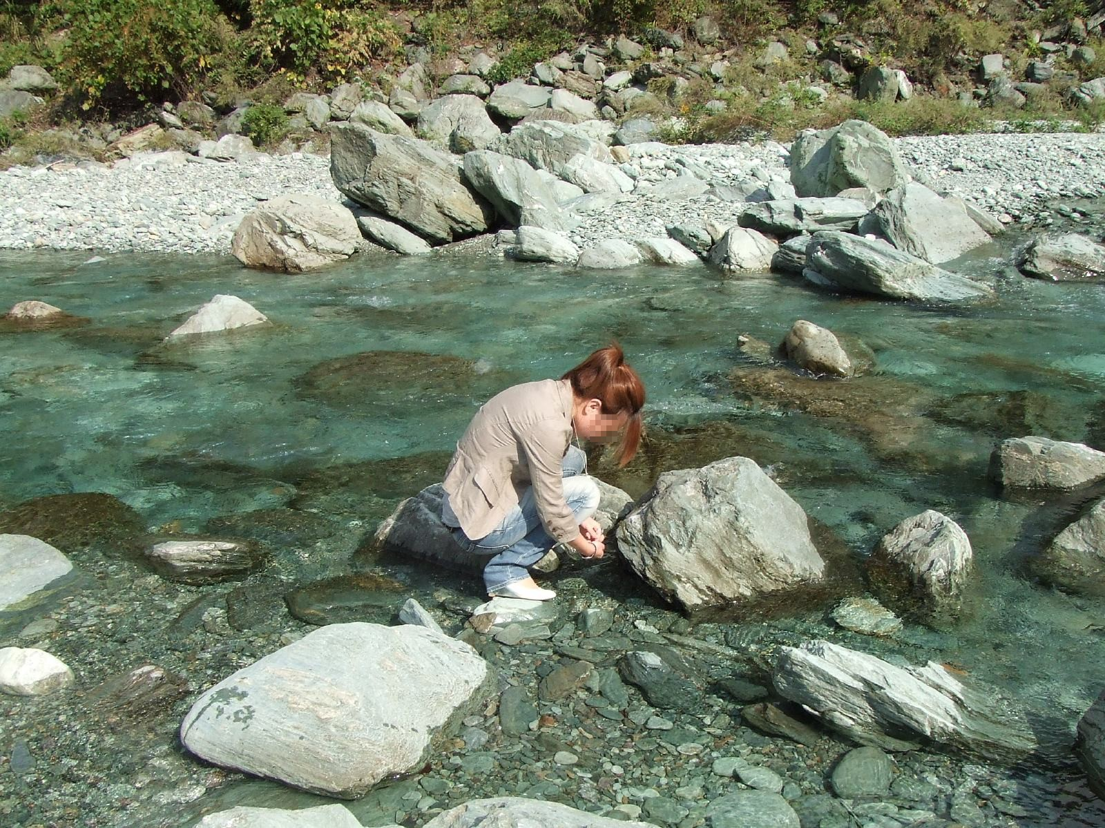 チロルの森の園内を流れる清流